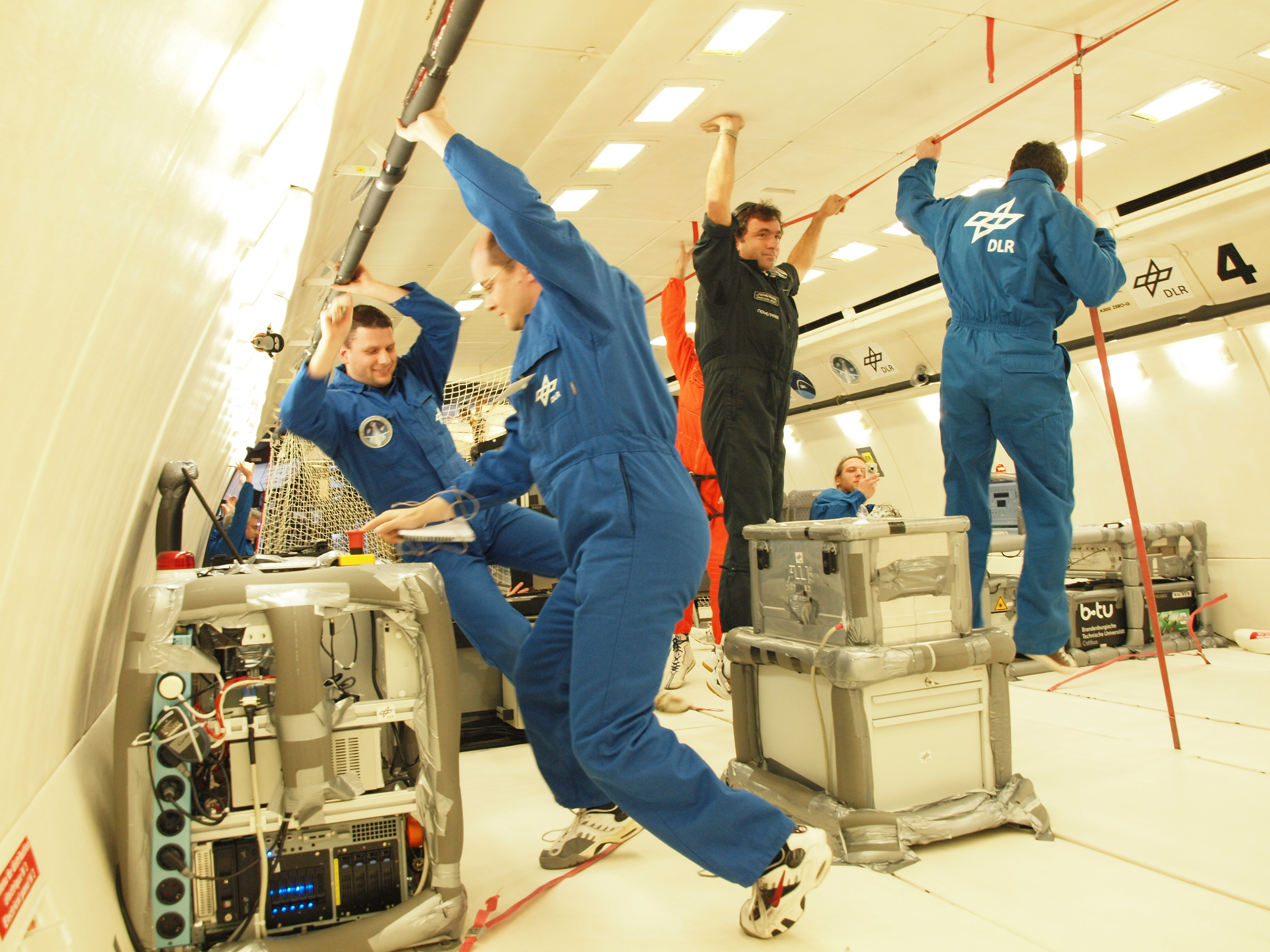 16. Parabelflugkampagne - während der Schwerelosigkeit müssen sich die Forscher gut festhalten, wollen sie an den Geräten noch etwas einstellen.